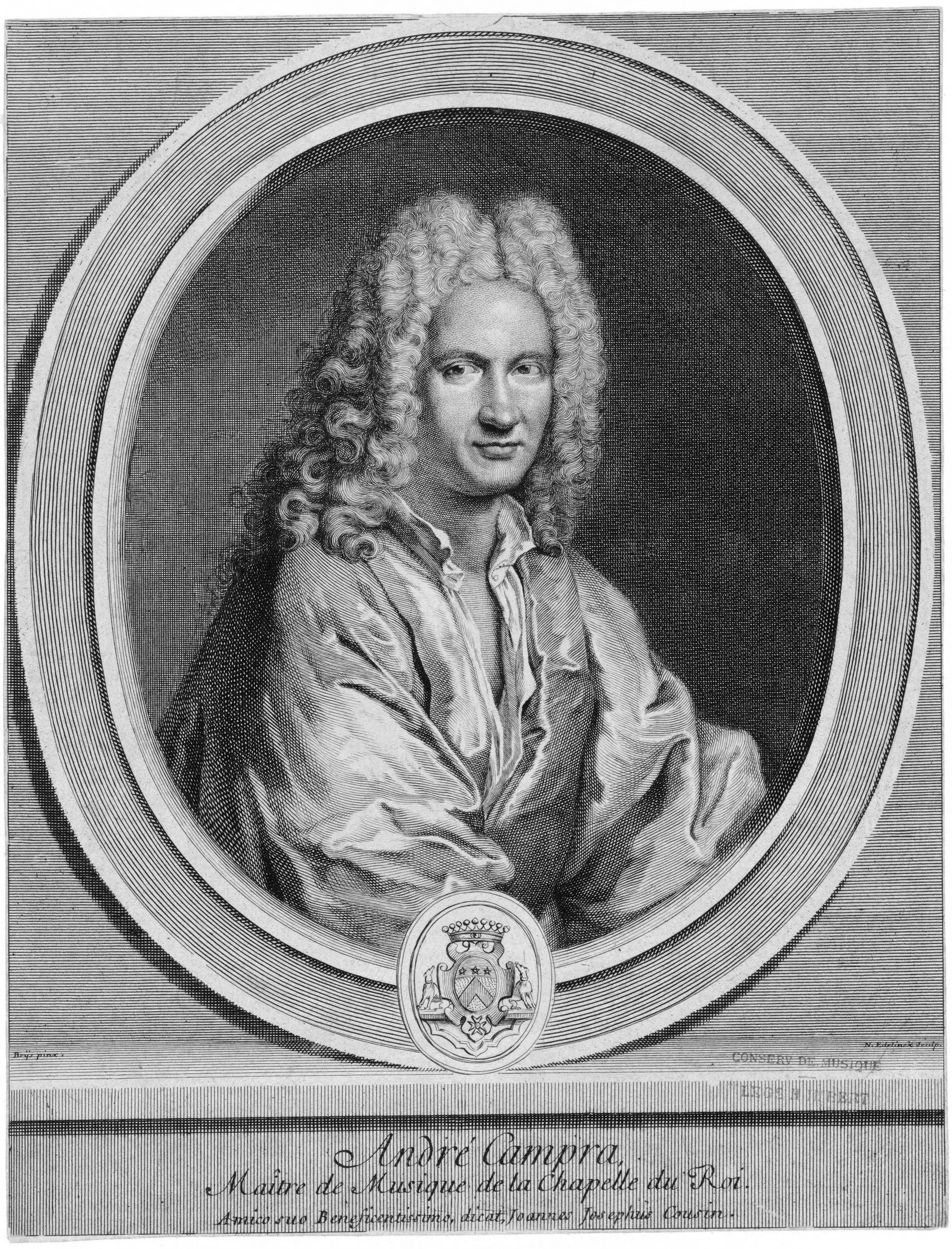 Depicted person: André Campra